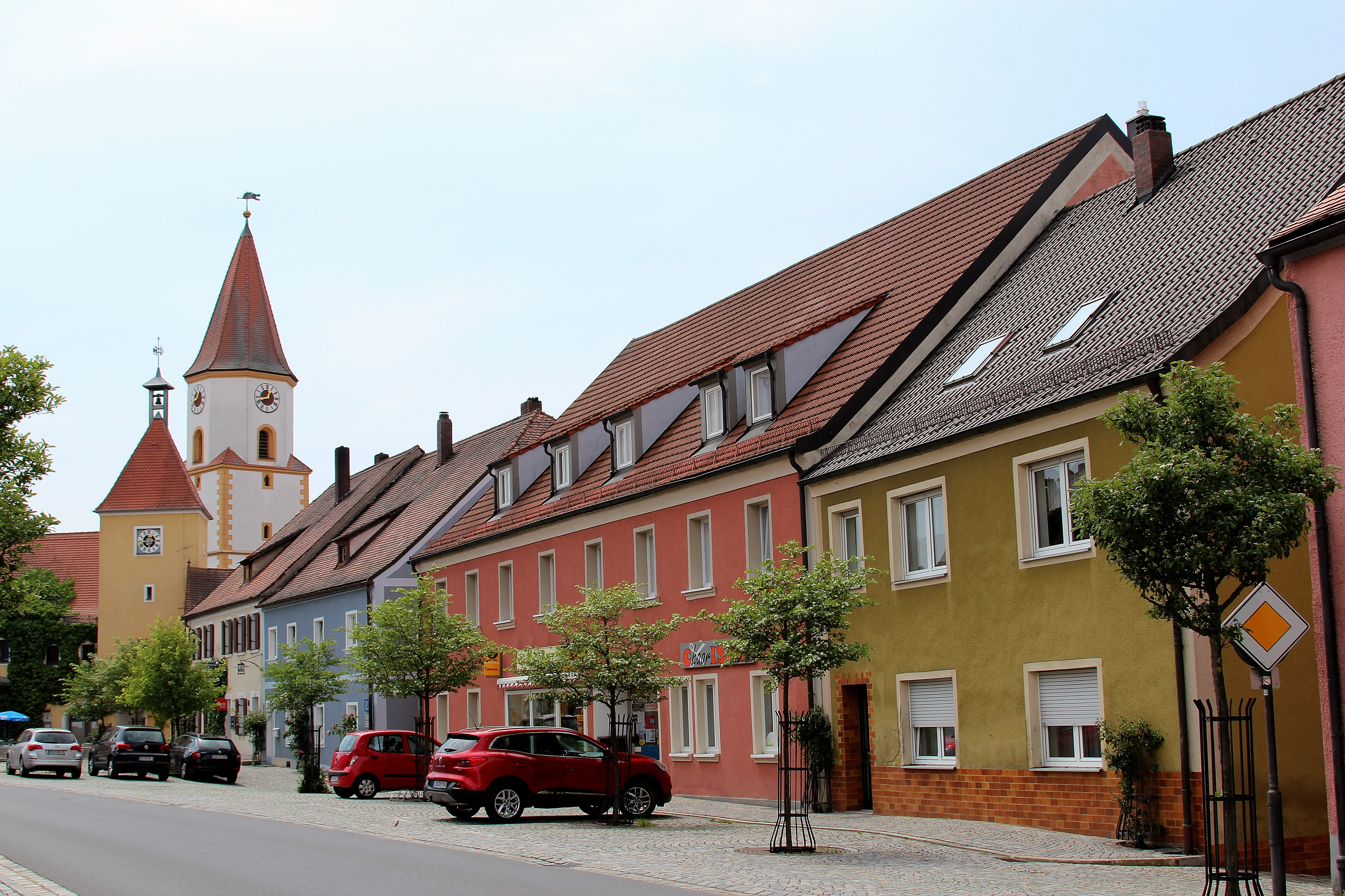 Ortsdurchfahrt Luhe, das rote Haus ist das Geburtshaus von Bernhard M. Baron; Markt Luhe-Wildenau, Landkreis Neustadt an der Waldnaab, Oberpfalz, Bayern